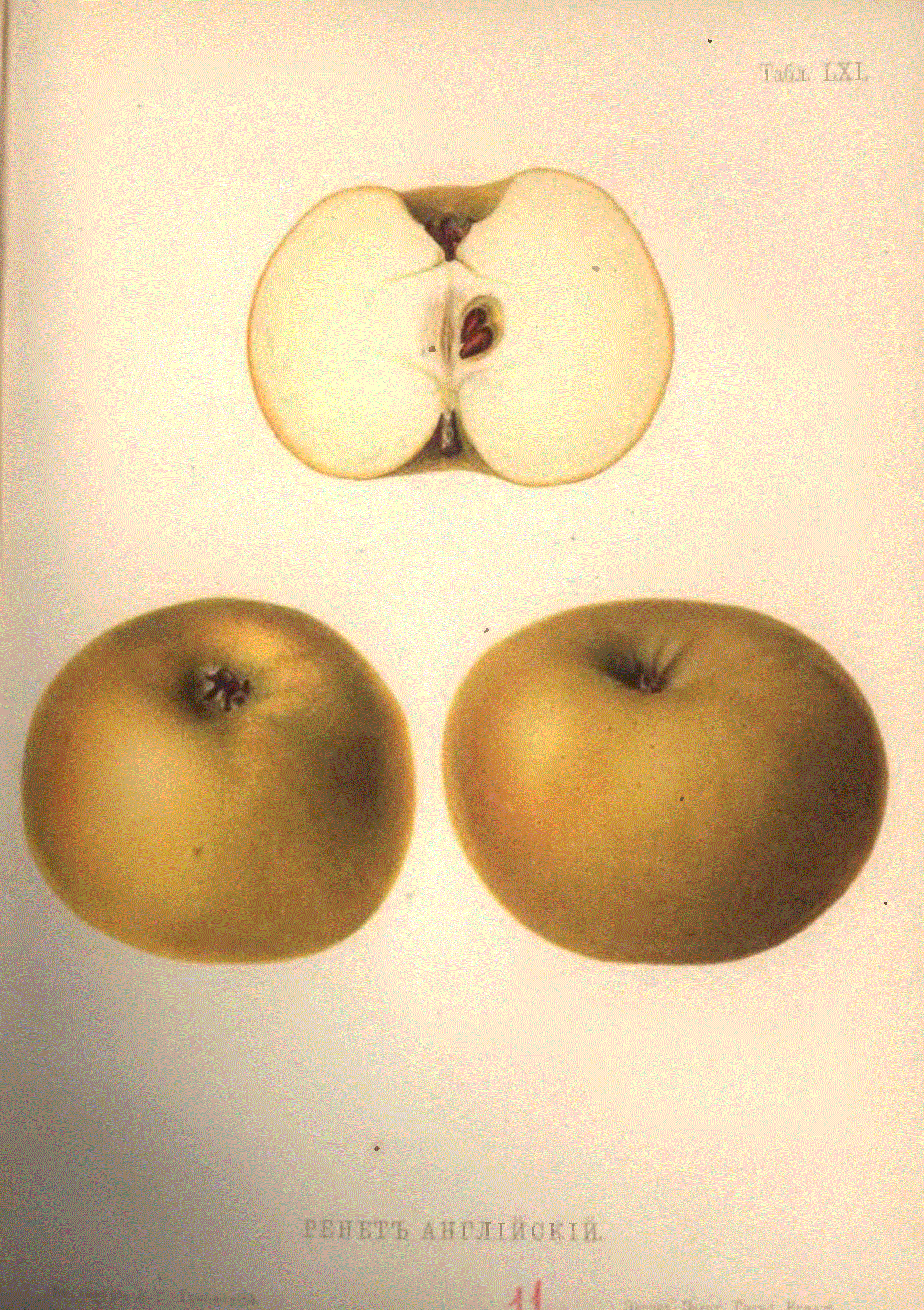 Ренет английский